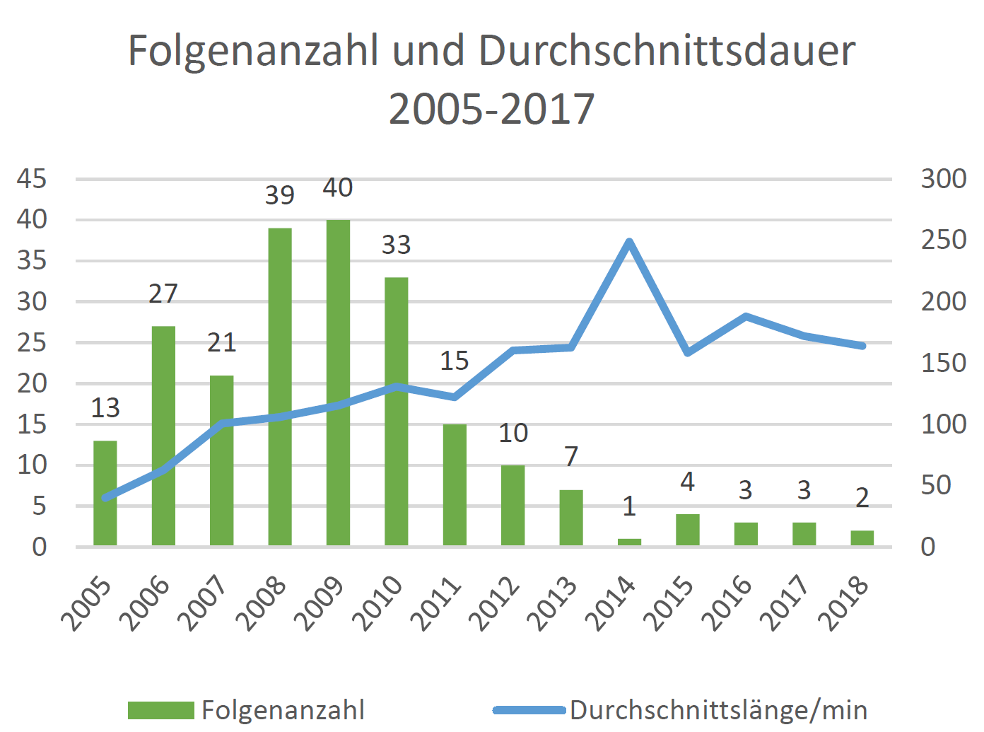 Diagramm, in dem die Anzahl der Folgen pro Jahr und die jährliche Durchschnittslänge der Folgen von CRE abgetragen sind.